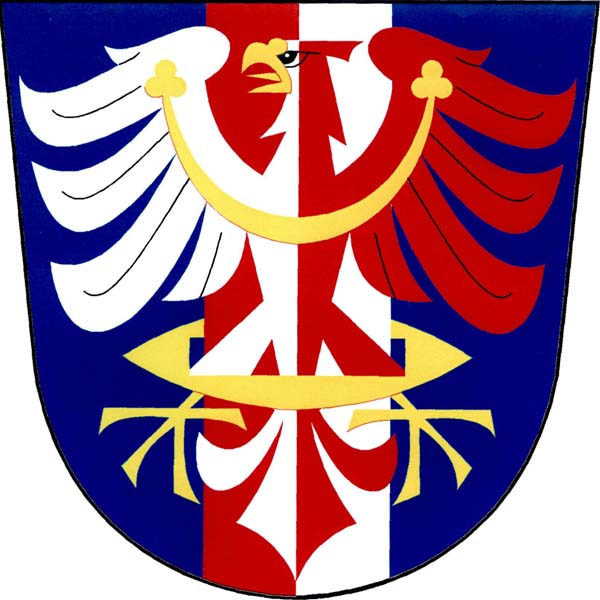 Znak obce Horní Radechová